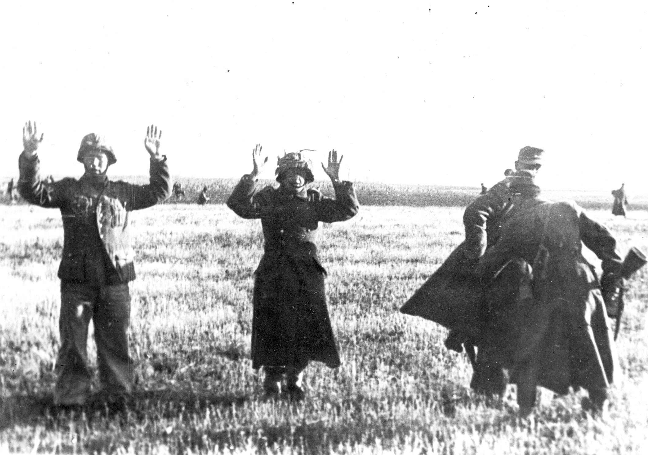 Srpskohrvatski / српскохрватски: Zarobljeni Nemci prilikom proboja Sremskog fronta aprila 1945.